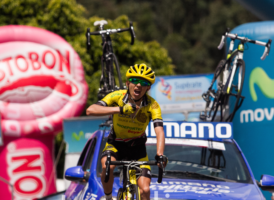 Eta10. Vuelta a Colombia 2015 - Miércoles 12 de agosto de 2015. Villamaría - Alto de Minas (162 Kms)